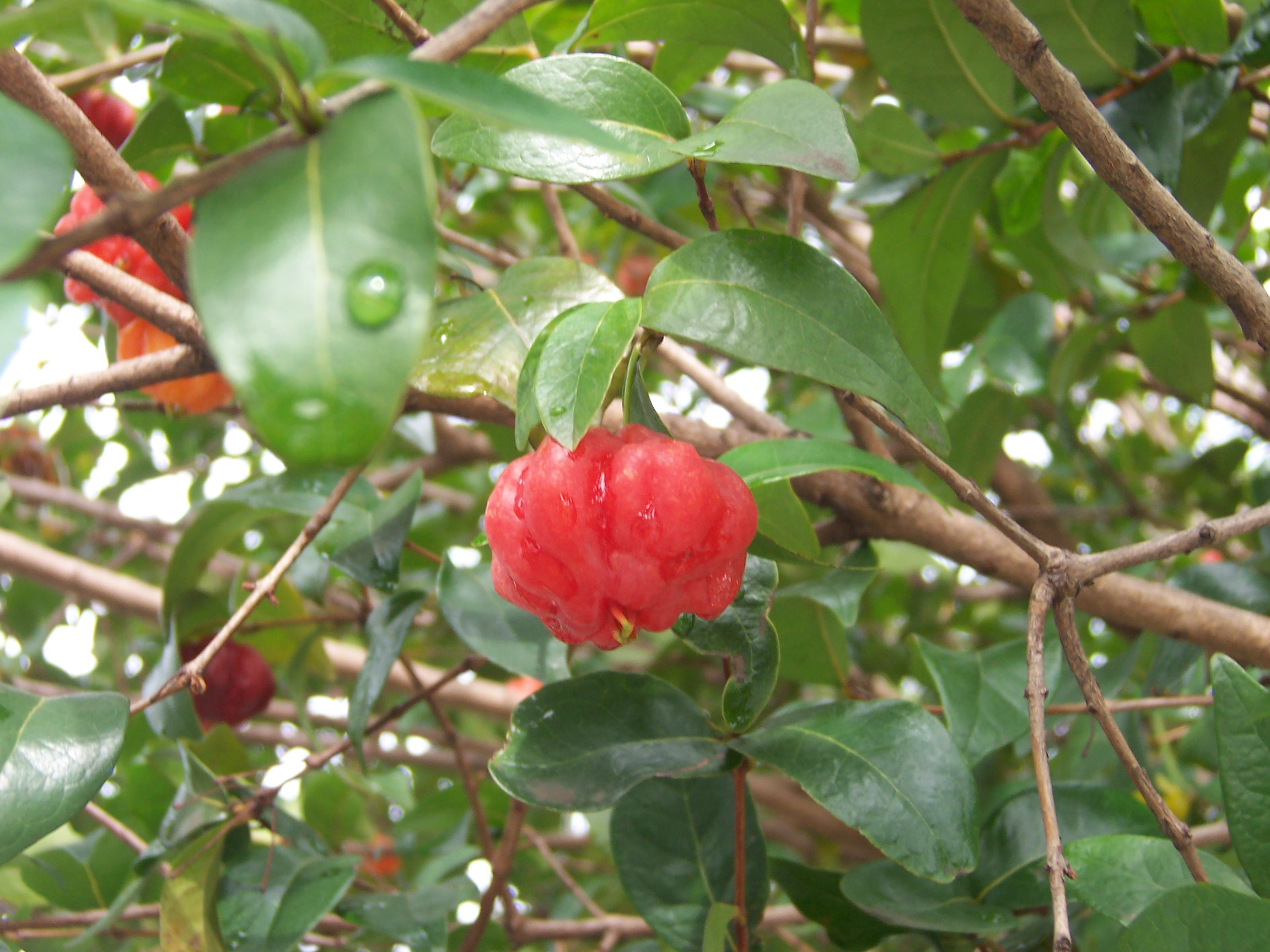 Eugenia uniflora, Myrtaceae (Réunion island)